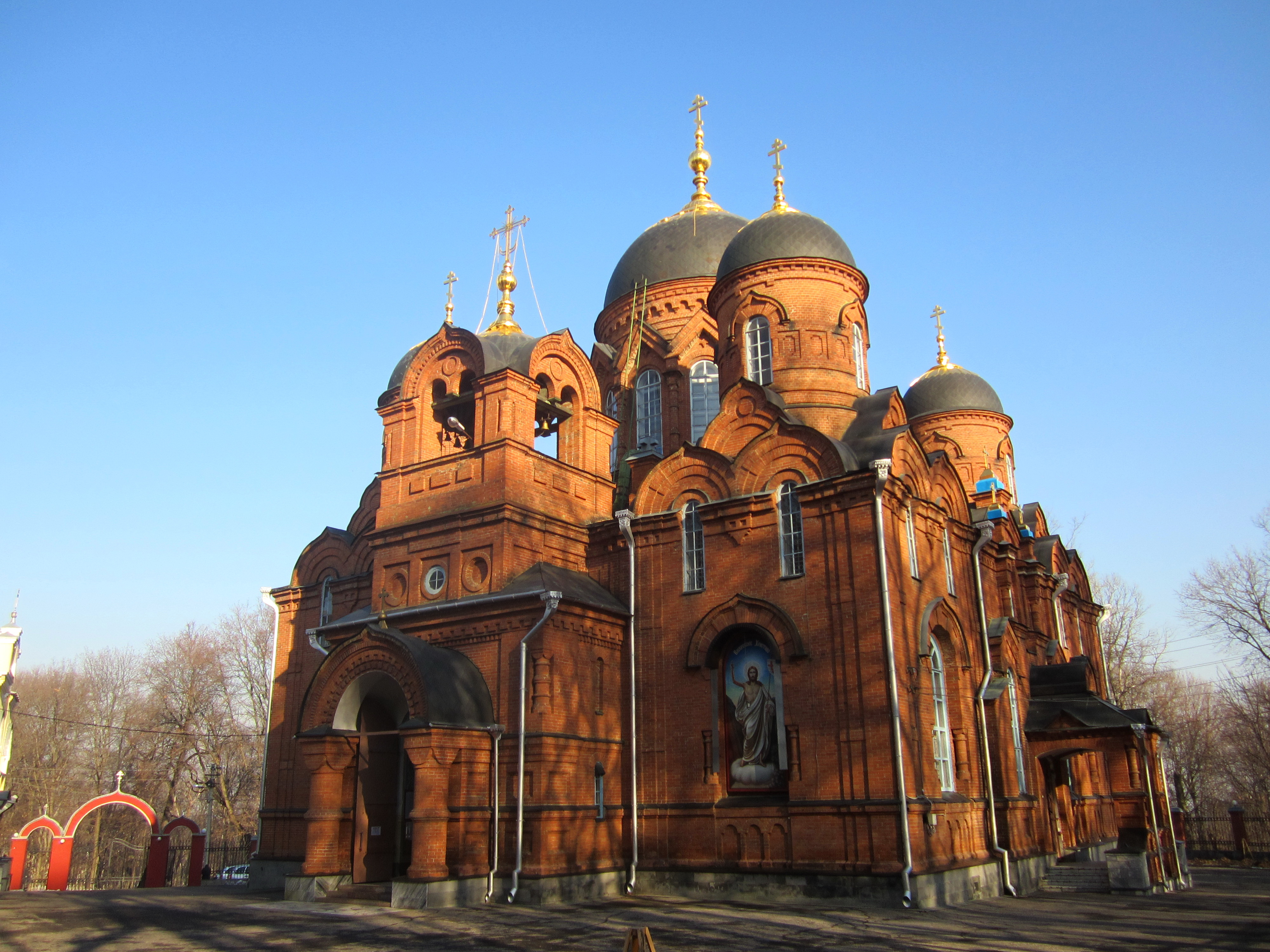 Успенский кафедральный собор (Мироносицкая церковь) с интерьером (Пензенская область, Пенза, Мироносицкое кладбище)